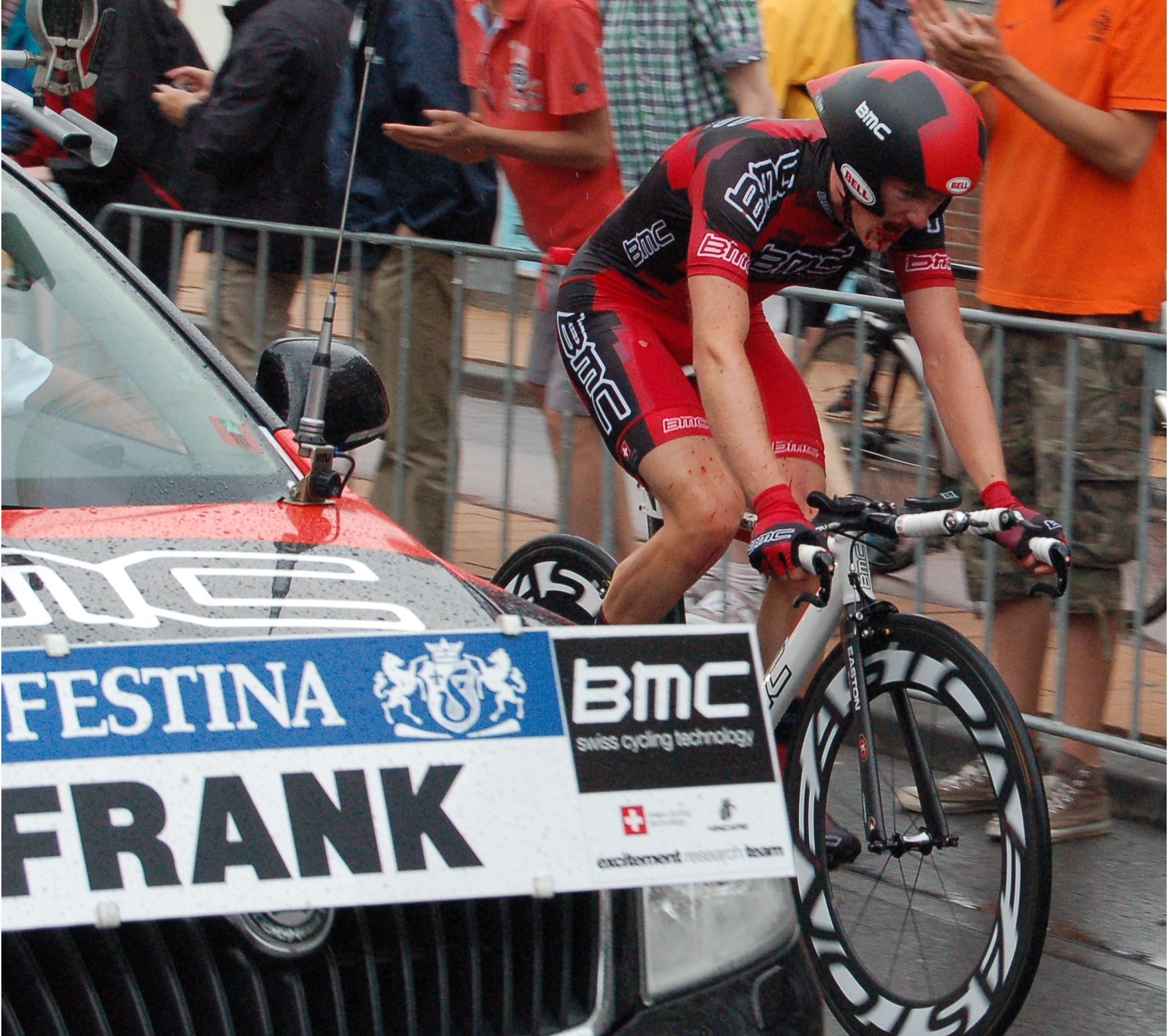 Prologue du Tour de France 2010 à Rotterdam - Mathias Frank